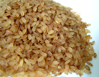 അരി